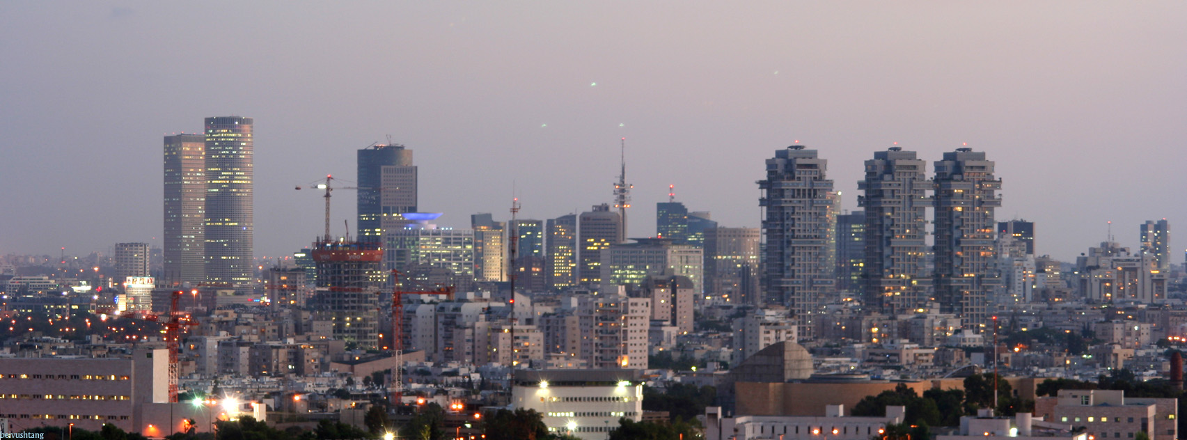 Tel Aviv At dusk taken from Tel Aviv university, September 2005